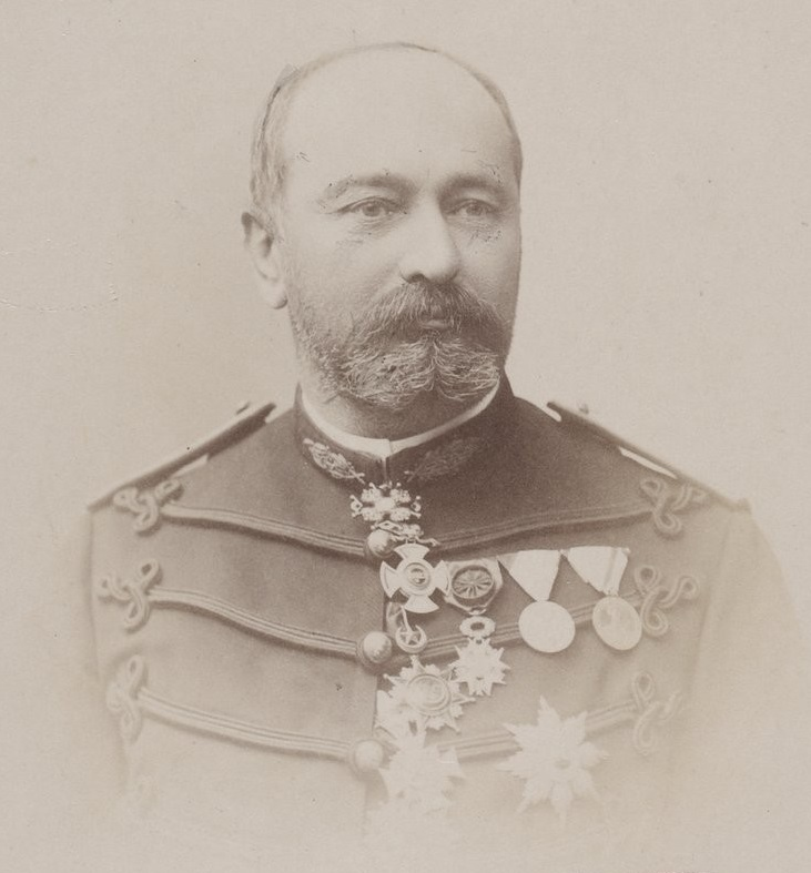 Jean-Baptiste Feuvrier par Eugène Pirou